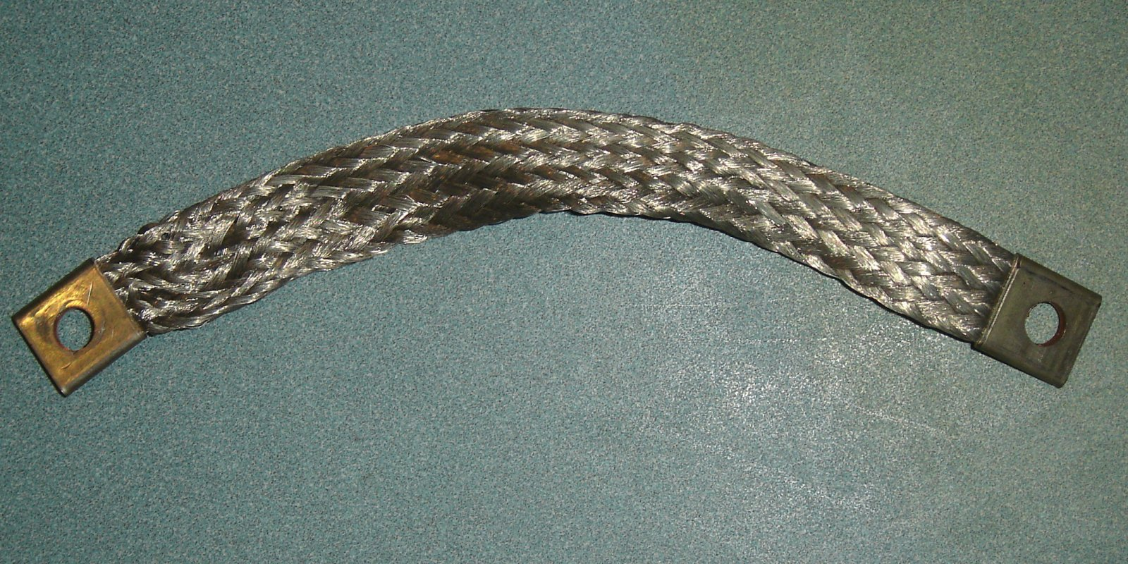 Masseband